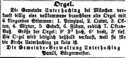 Anzeige im "Wochenblatt für das christliche Volk" zum Verkauf der Orgel der Gemeinde Unterhaching, Landkreis München, Juni 1872.